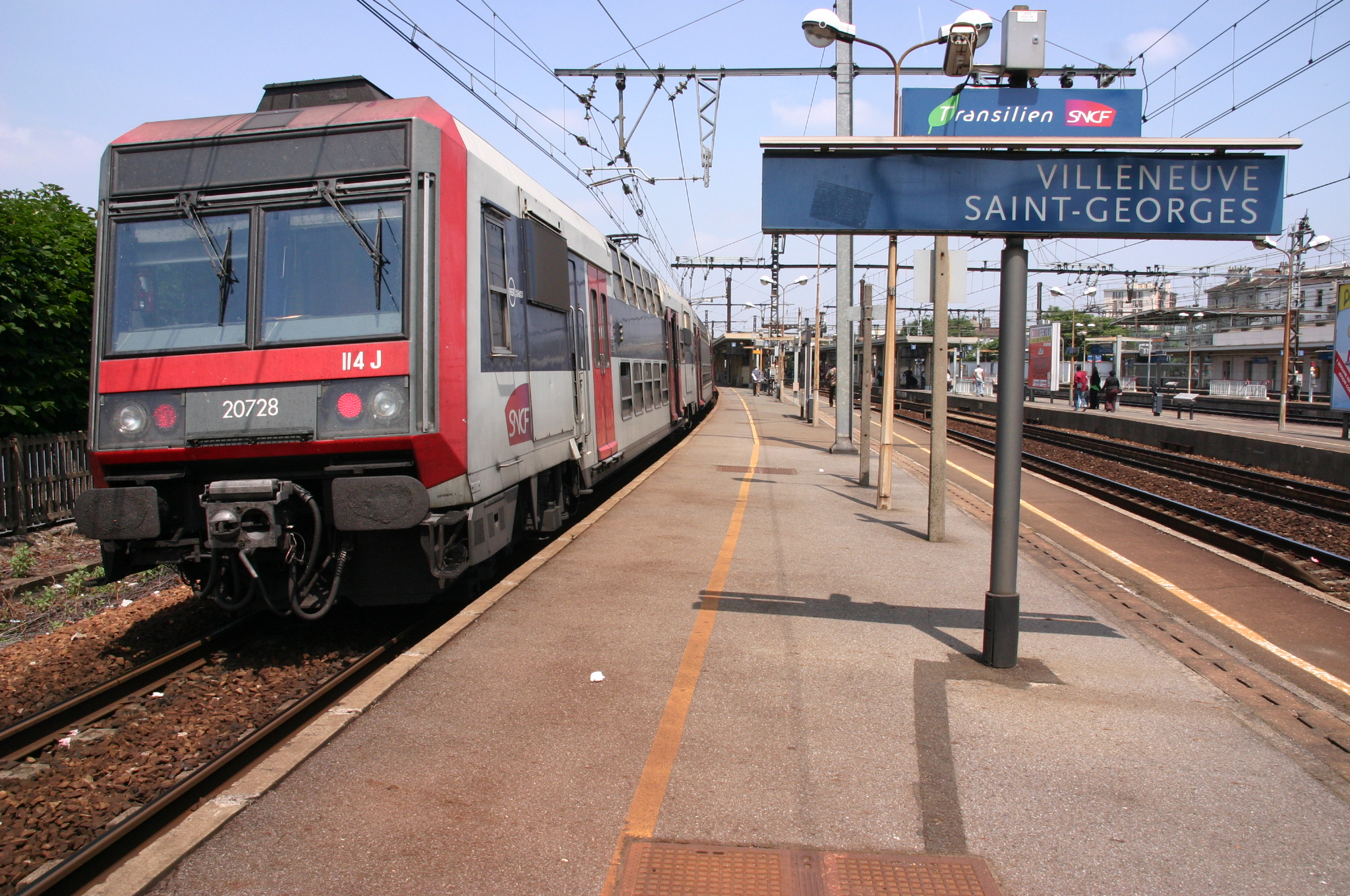 La Gare de Villeneuve-Saint-Georges, Villeneuve-Saint-Georges, département du Val-de-Marne, France